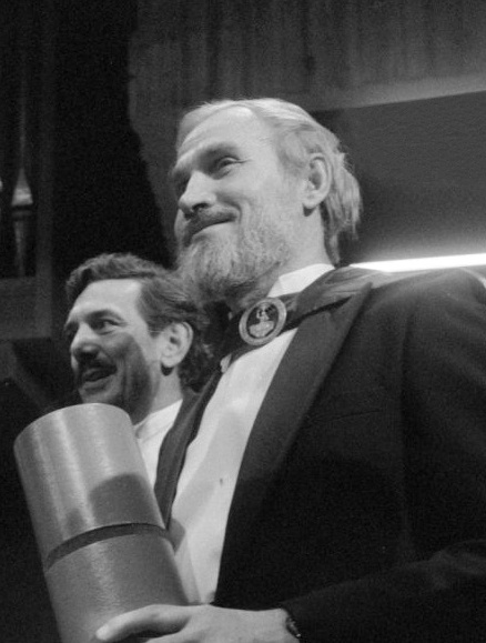 Eredoctoraat VU voor Russische dissidente psychiater A. J. Koryagin